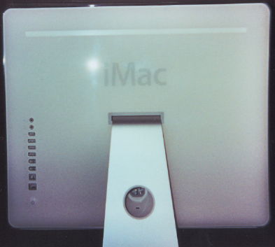 Sujet : iMac G5 du printemps 2005 Date : 29 juillet 2005 Auteur : Archeos Description : ordinateur monobloc d'Apple Computer, écran 20", fréquence 2 Ghz, vu de dos, avec tous les ports visibles (de haut en bas : entrée son, sortie son optique 7-1, sortie mini-VGA, trois ports USB dont un USB2, deux ports FireWire, un port modem, un port Ethernet. En-dessous, le bouton de démarrage/mise en veille. Le pied possède un passage pour le cable d'alimentation, par lequel on voit le branchement secteur (avec un emplacement pour antivol en-dessous). La ligne blanche du haut est formée par les ouïes d'aération. Licence : 3 août 2005 à 06:39 Archeos 393x353 (212 084 octets) (* Sujet : :fr:iMac G5 du printemps 2005 * Date : 29 juillet 2005 * Auteur : :fr:Archeos * Description : ordinateur monobloc d' :fr:Apple Computer , écran 20", fréquence 2 Ghz, vu de dos, avec tous les ports visi)